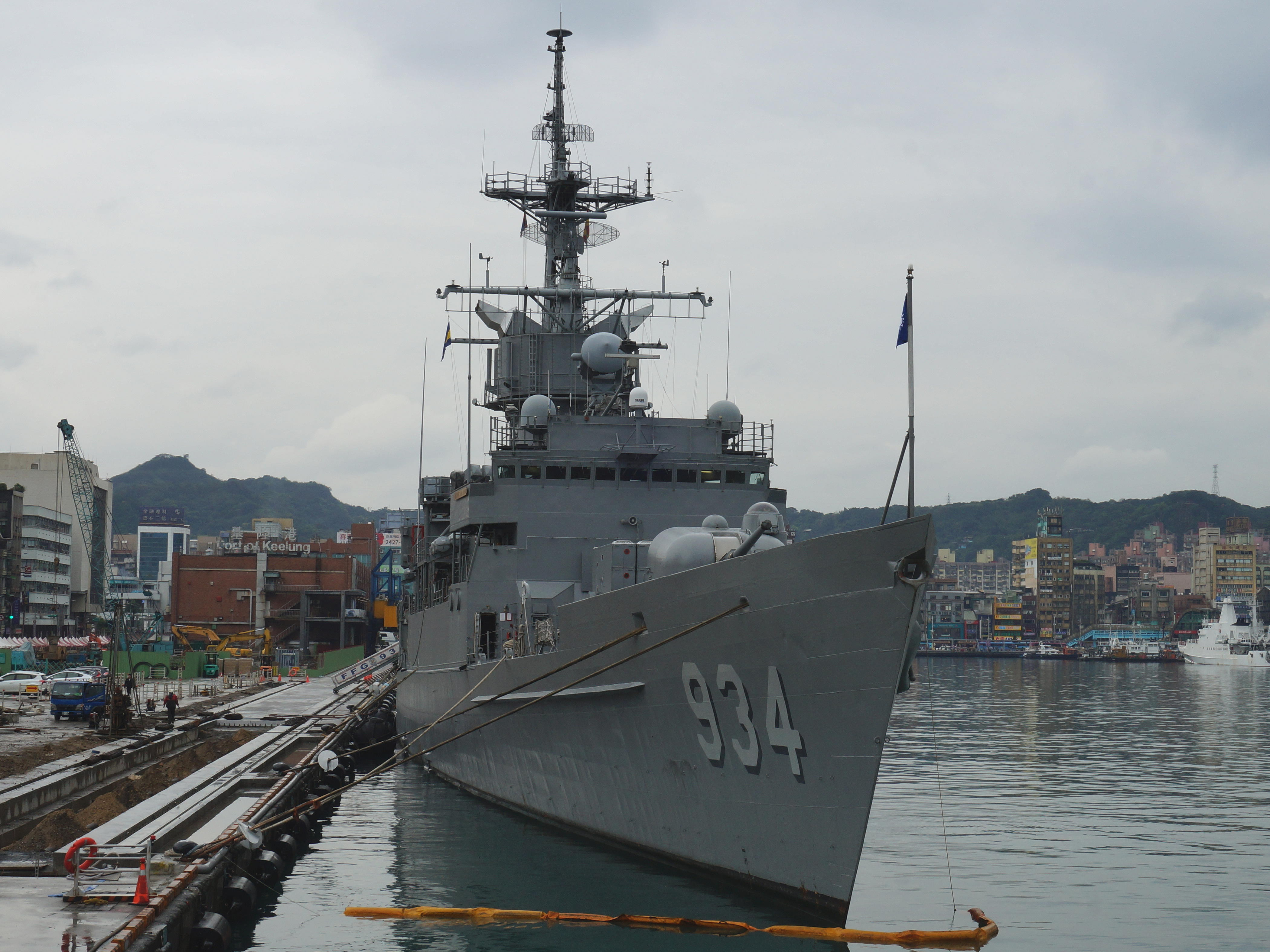 基隆港東岸海軍碼頭，中華民國海軍汾陽軍艦（FFG-934）艦首。